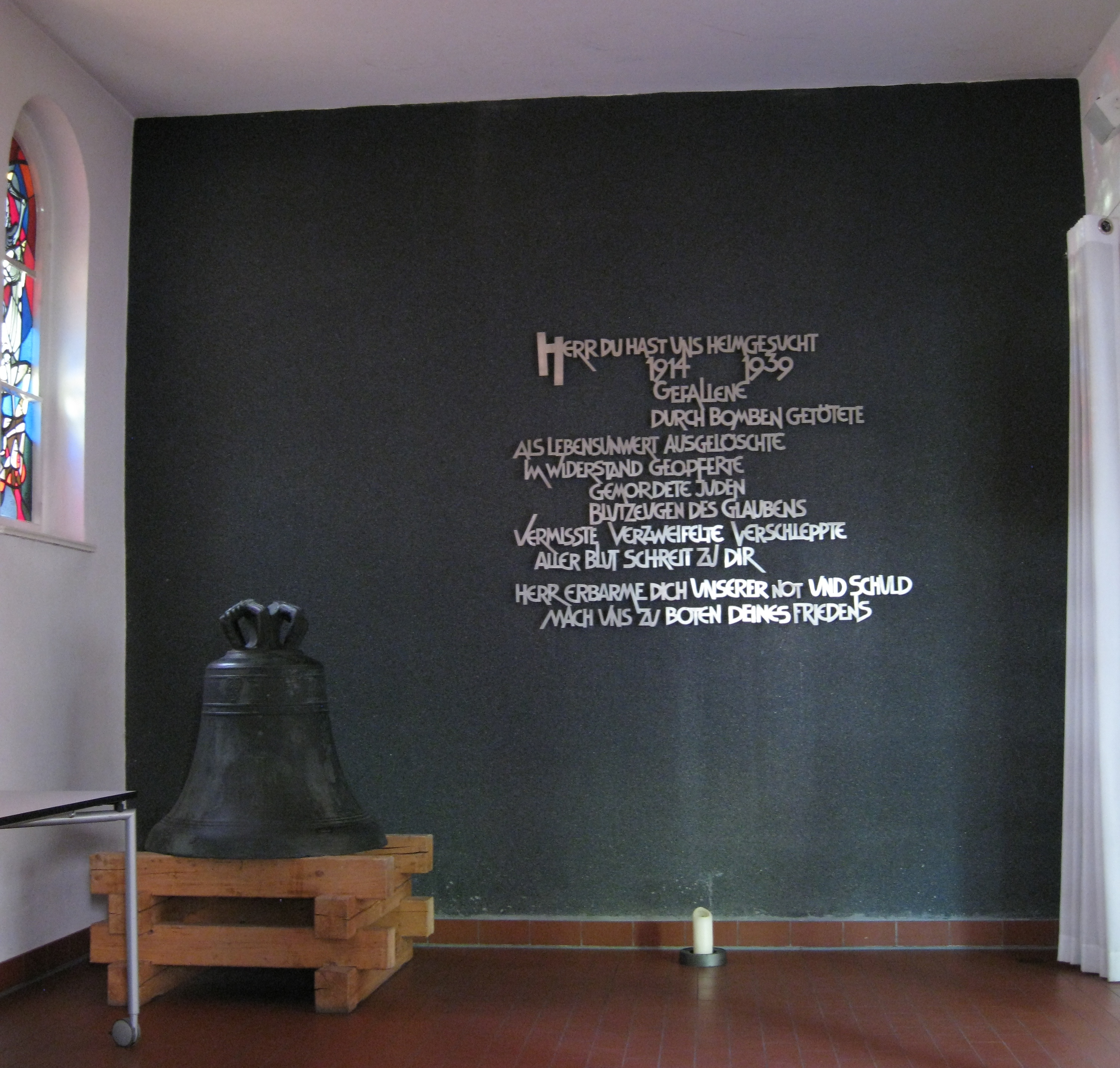 Vater-Unser-Glocke vor dem Mahnmal in der Johanneskirche Schlachtensee